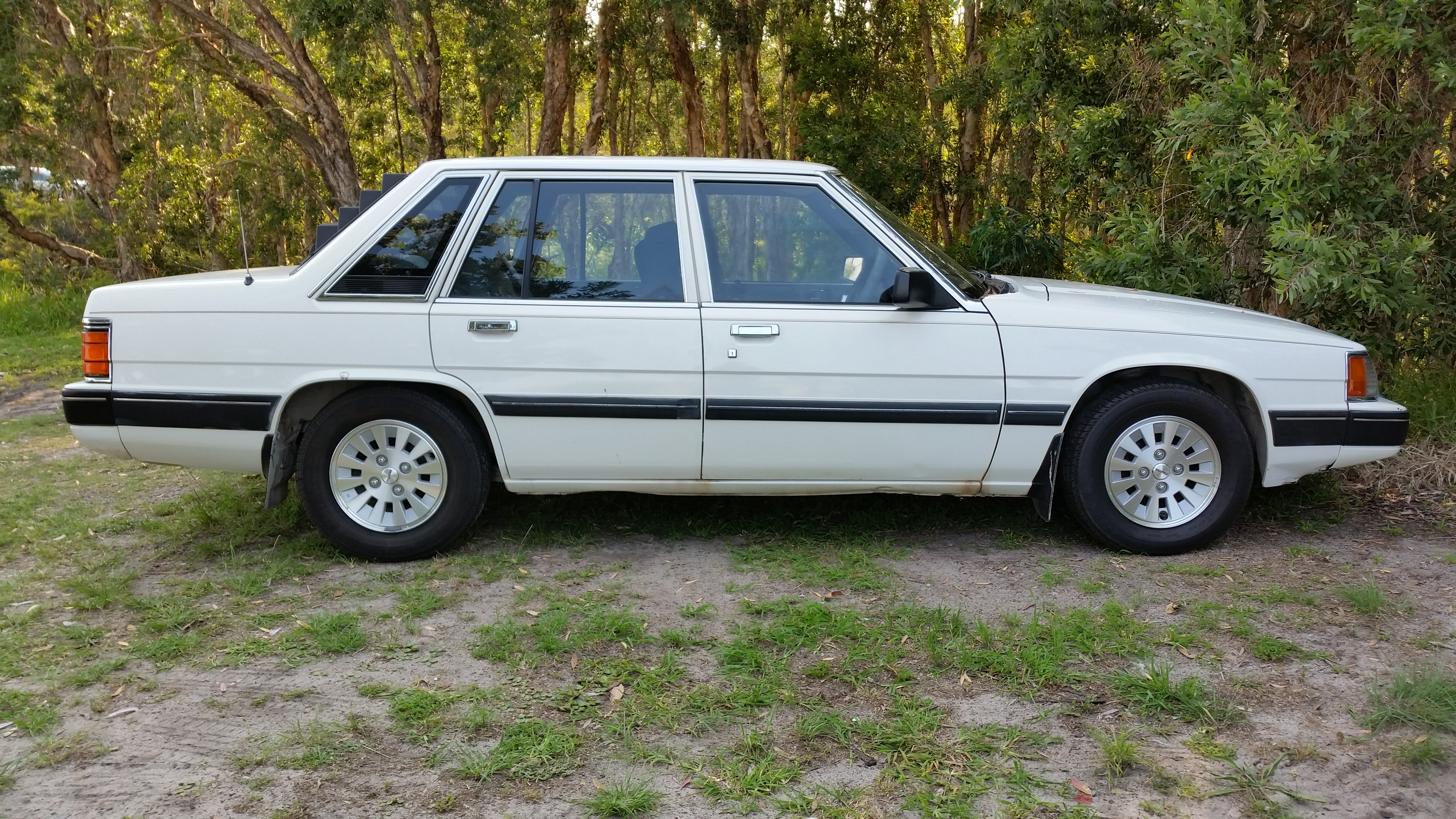 Mazda 929 HB